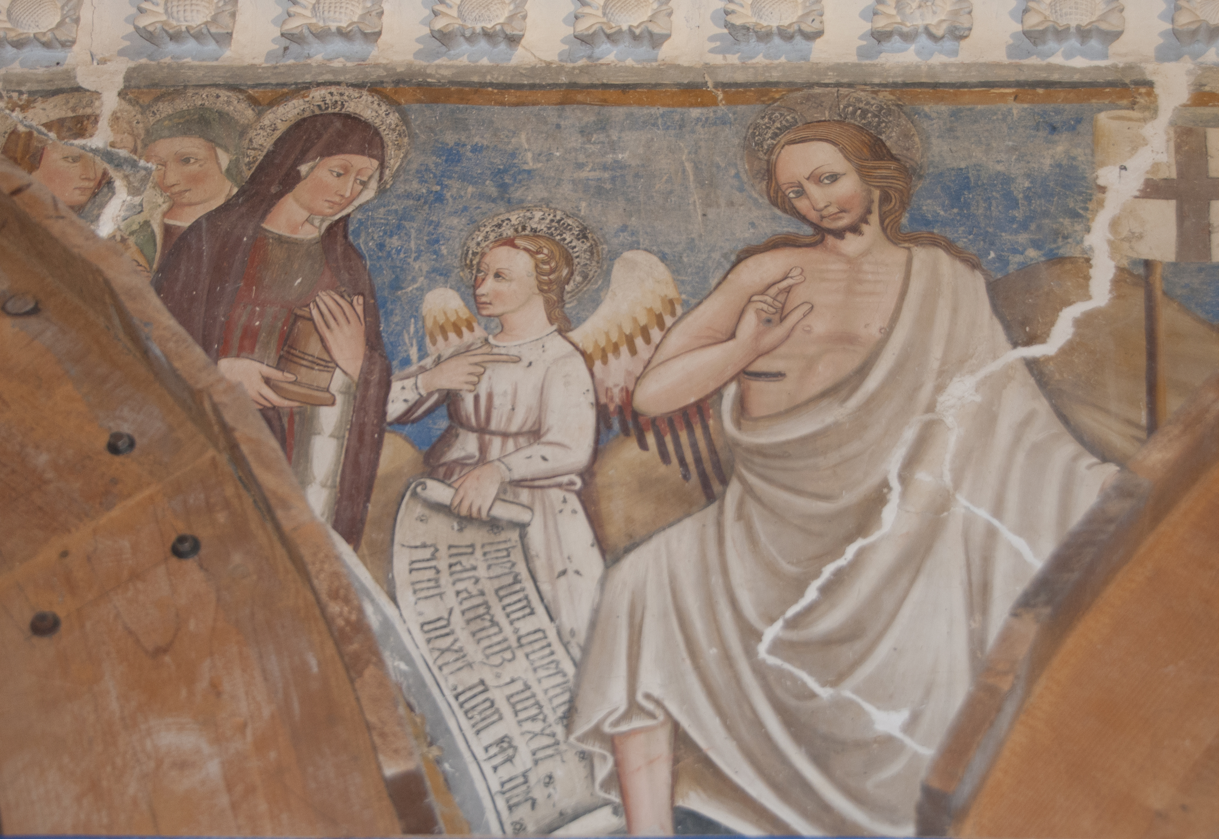 Chiesa di San Salvatore Campi. Le pie donne al Sepolcro, Resurrezione